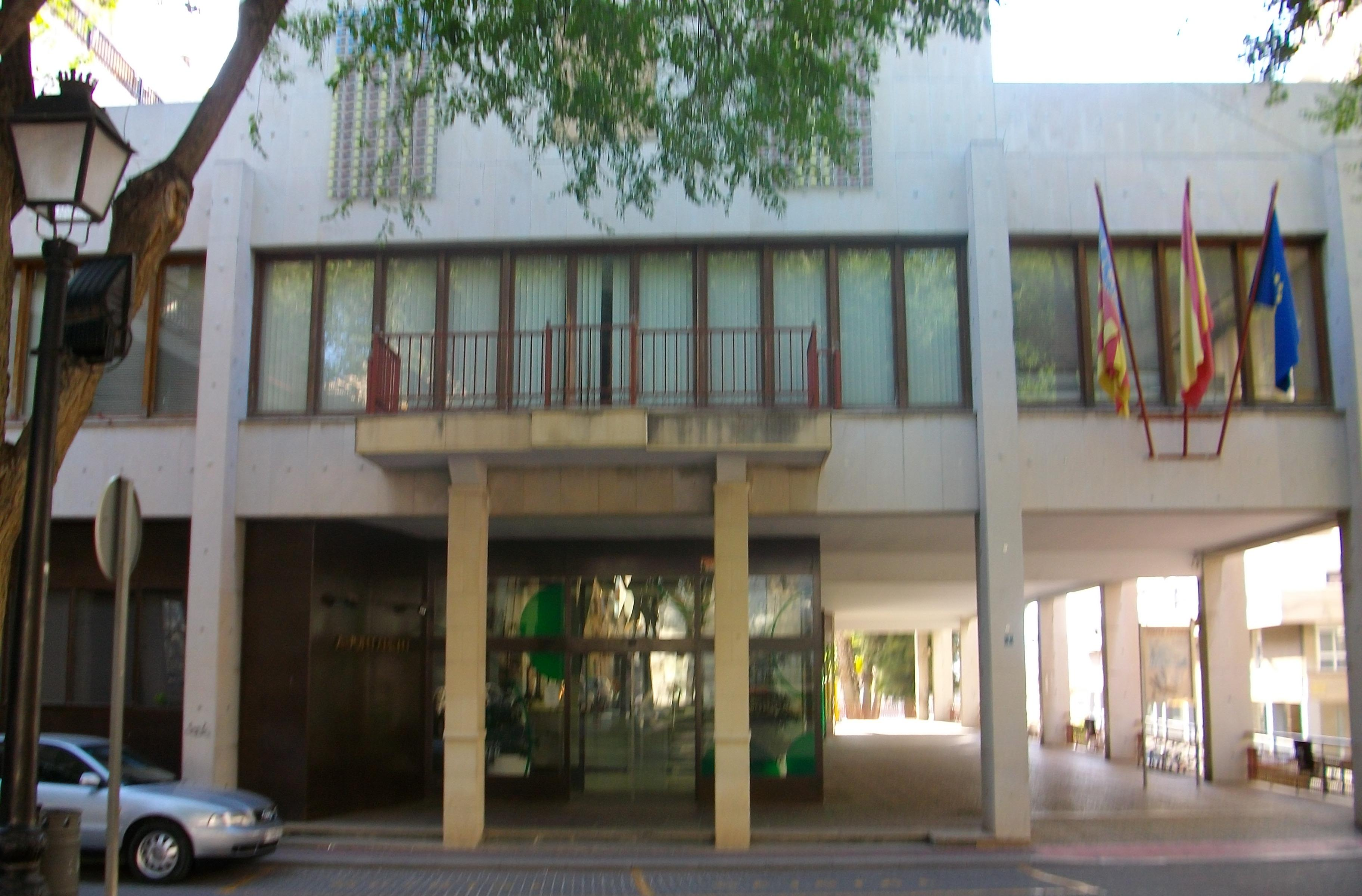 Sede del Ayuntamiento de Petrer